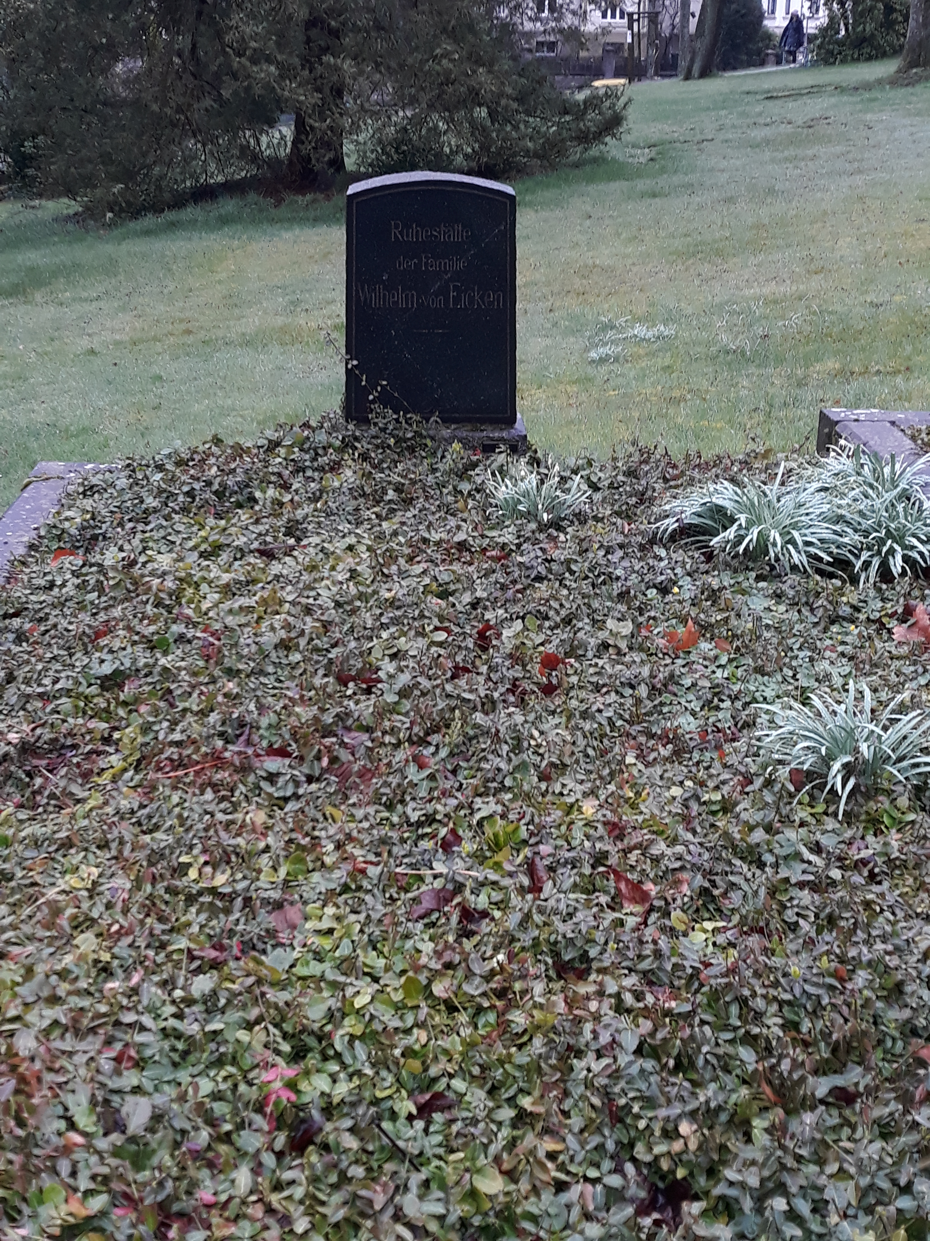 Das Grab des Tabakhändlers Wilhelm von Eicken auf dem Alten Friedhof Mülheim an der Ruhr.